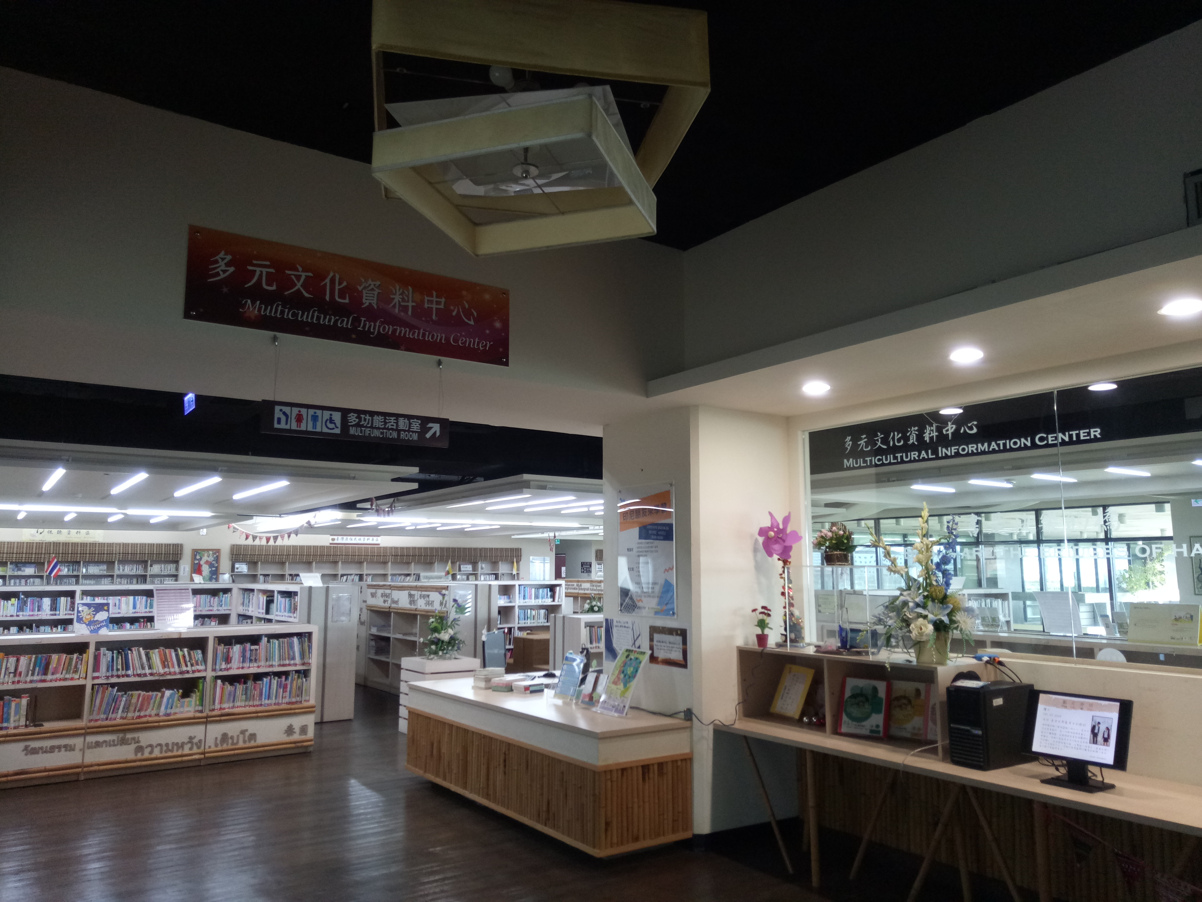 臺北市立圖書館總館9樓，多元文化資料中心。含越南、緬甸、印尼、馬來西亞、泰國、菲律賓、印度、韓國等8國語文圖書區